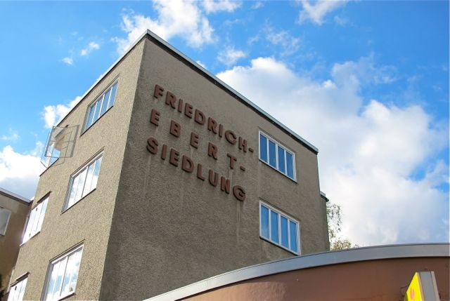 Hus med texten Friedrich-Ebert-Siedlung på Afrikanische Straße i Berlin.